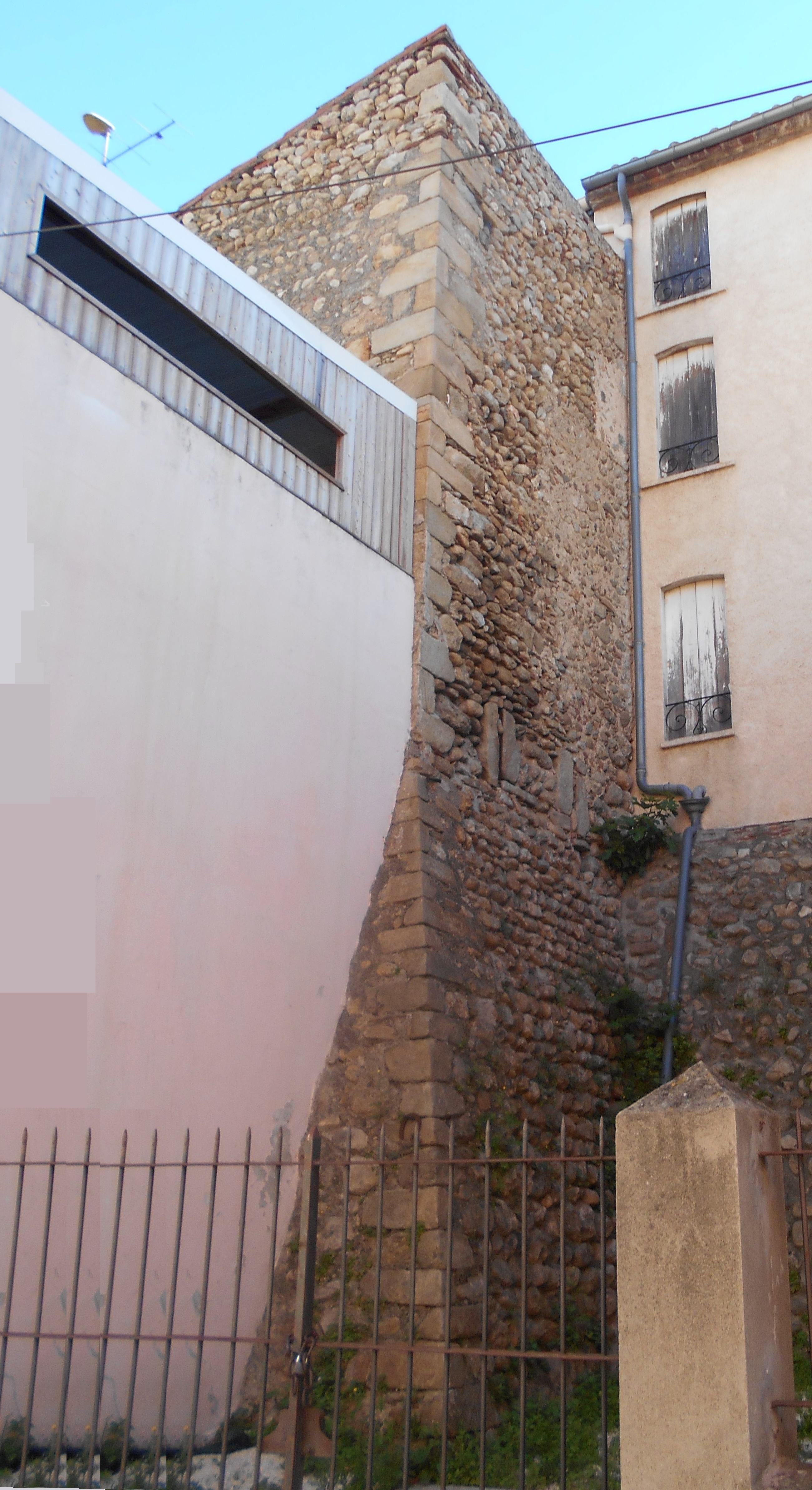 Muralles de la vila d'Argelers de la Marenda.